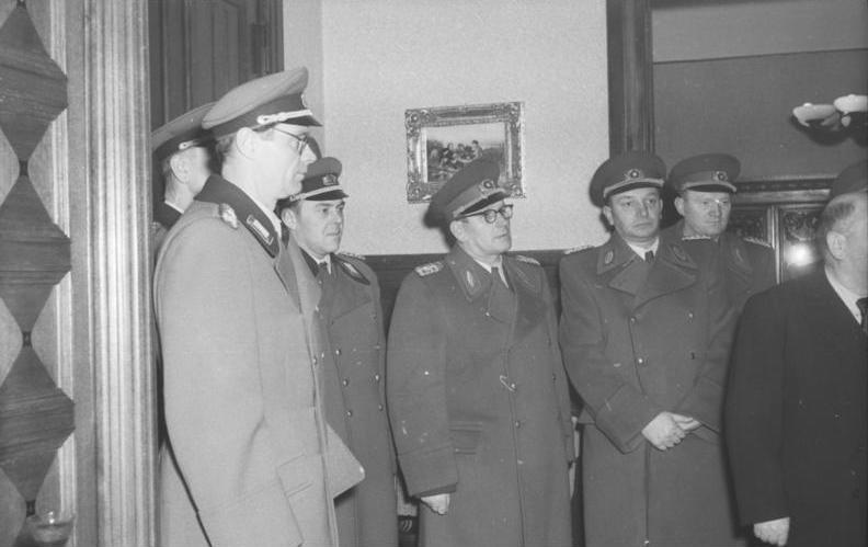 ADN-ZB/Heilig/Sturm 3.1.1956 80.Geburtstag von Präsident Wilhelm Pieck am 3.1.1956 Vor und in der Wohnung des Präsidenten Wilhelm Pieck fanden sich in den frühen Morgenstunden des Geburtstages die ersten Gratulanten ein. In der Wohnung des Präsidenten: Eine Delegation der Polizei, der Kasernierten Volkspolizei, des Ministeriums des Innern und des Ministeriums für Staatssicherheit überbrachte dem Präsidenten Glückwünsche. Der Minister für Staatsschicherheit Ernst Wollwerber (Bildmitte) spricht im Namen der Delegation. Von rechts nach links: Generalmajor Dollwetzel, Generalleutnant Vincenz Müller, Generalmajor Friedrich Dieckel, Generalmajor Walter, Generalmajor Gartmann, Generalmajor Last, Chefinspekteur Hentschel und Chefinspekteur Seifert.